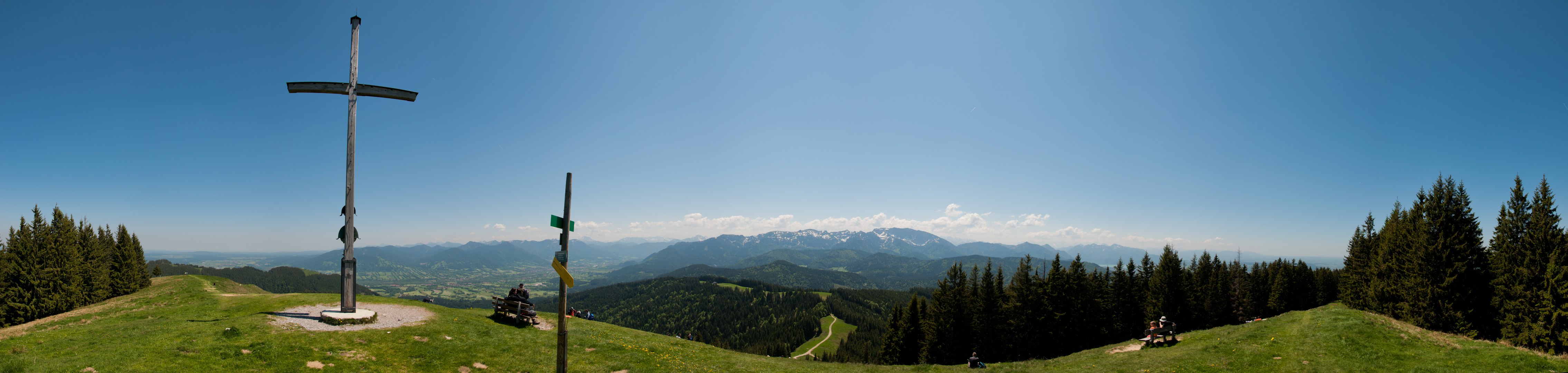 Blick vom Gipfel des Zwiesel in den Bayerischen Voralpen